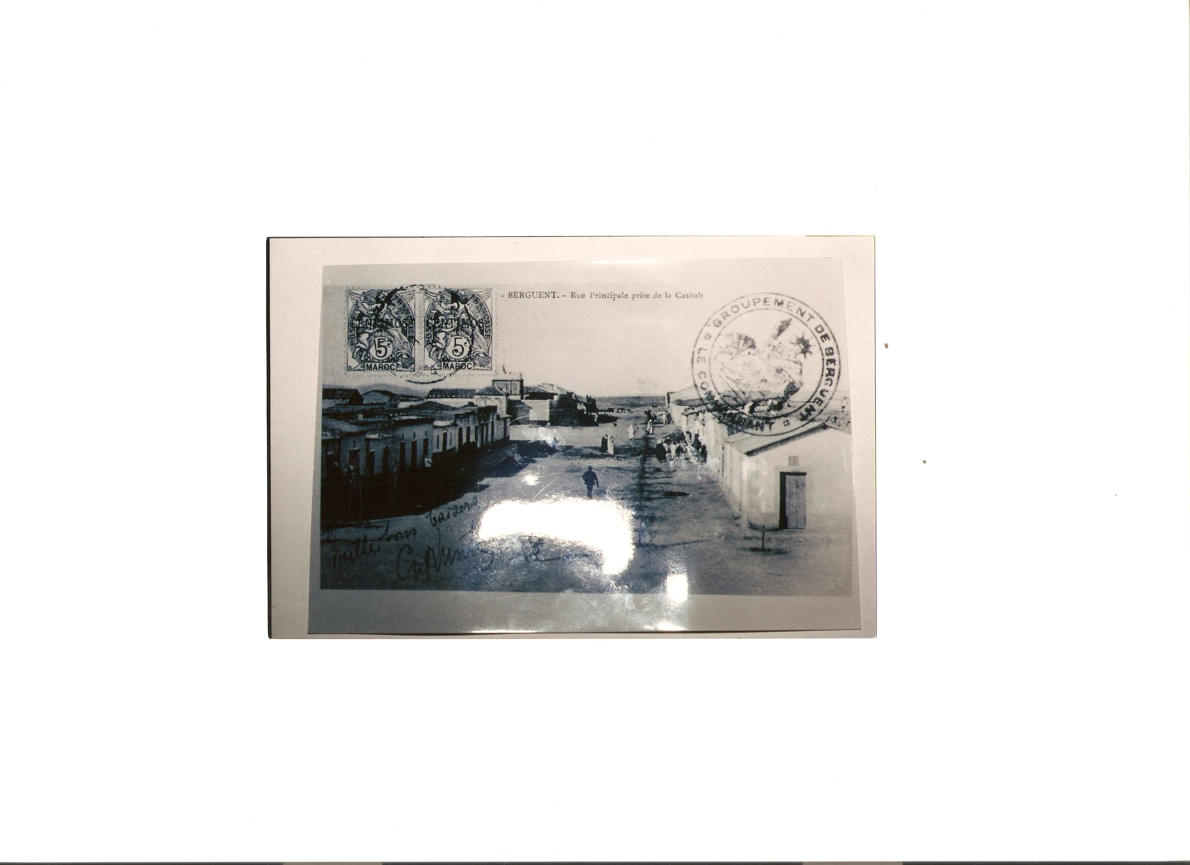 Rue principale de Berguent à l'époque du protectorat français.